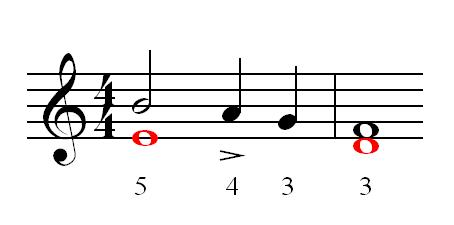 Näide reeglile, mille alusel on lubatud dissonants rõhulisel taktiosal, juhul kui laskuv käik algab poolnoodiga. Kasutatud on programme Finale 2005 ja MS Paint.